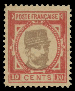 Марка генерала Жоржа Буланже, несостоявшегося диктатора Франции, 1880-е годы.